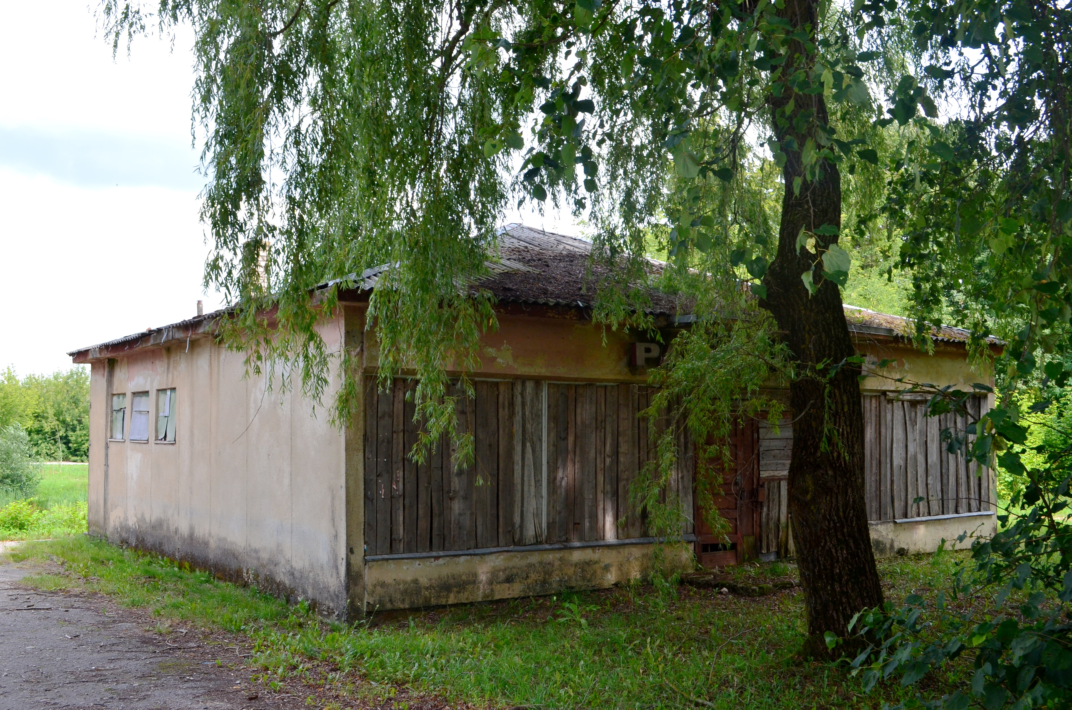 Daniūnų k., Ramygalos sen., Panevėžio raj.